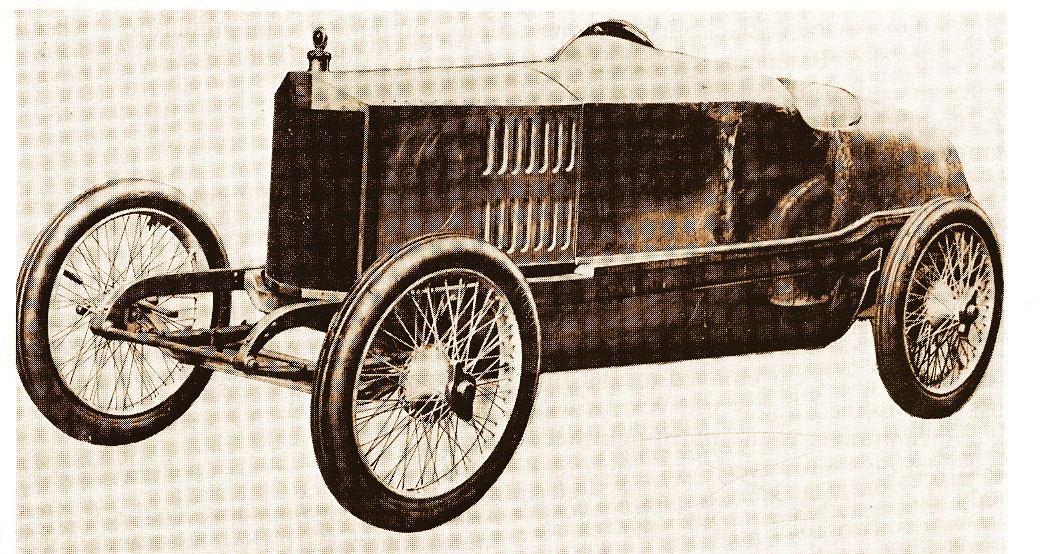 1921 BAC